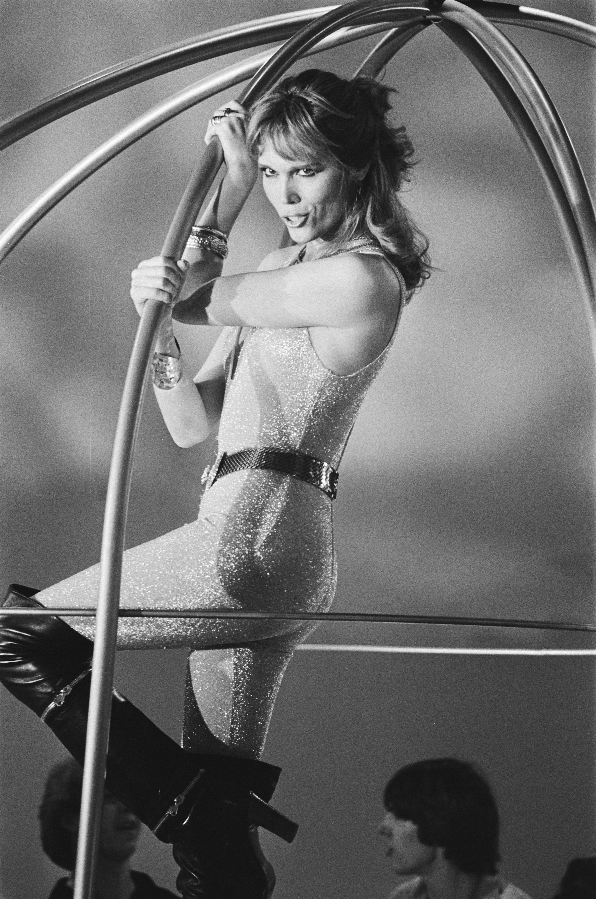 TROS tv "Disco show" Engeland, zangeres Amanda Lear.